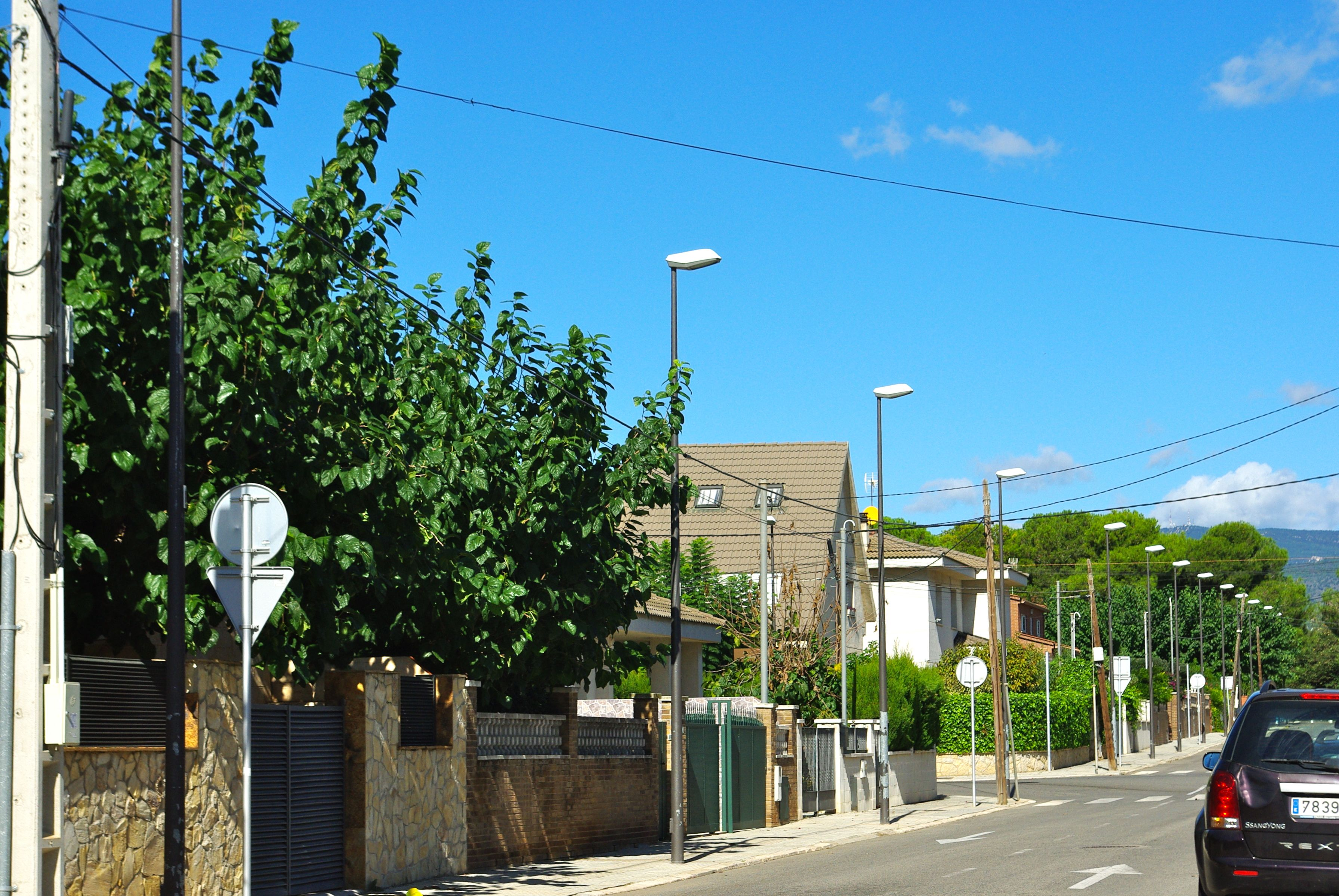 Urbanització del Mas del carpa